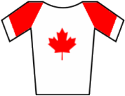 Maillot de Canadá